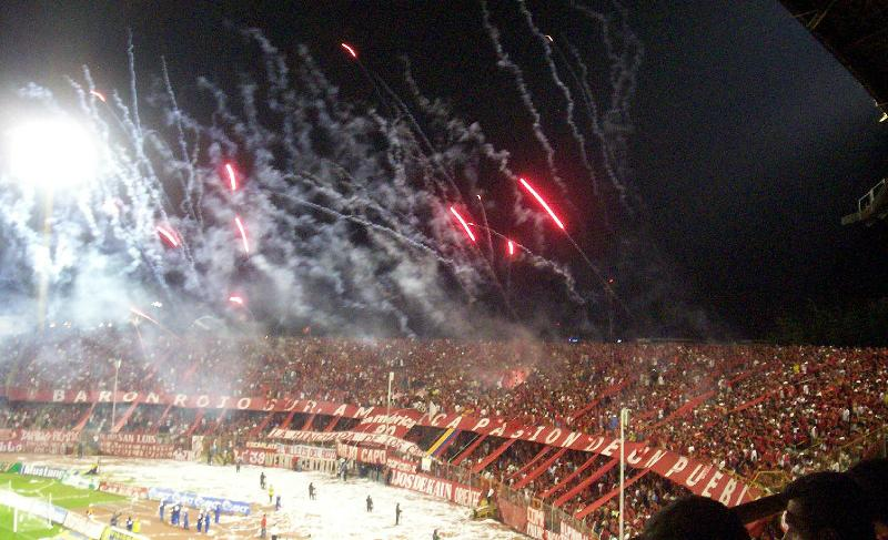 America vs Nacional 4 de Noviembre 2007